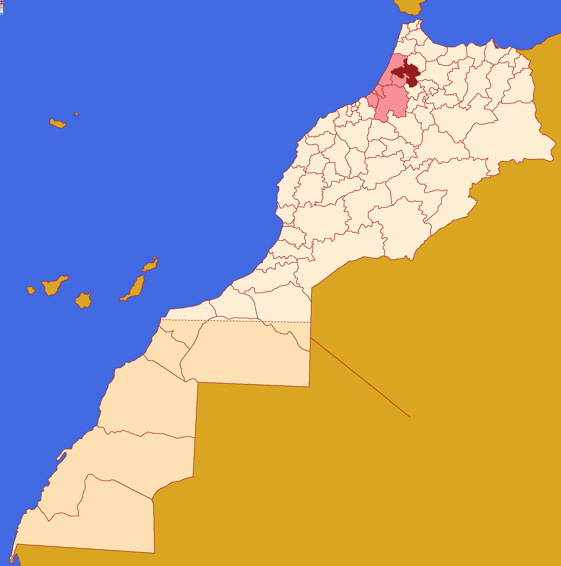 Localização da província de Sidi-Kacem dentro da região de Rabate-Salé-Quenitra e dentro de Marrocos. Conforme a reforma administrativa de 2015.